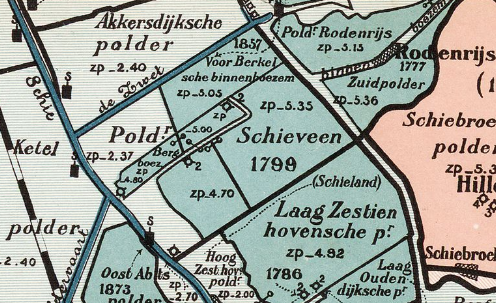 Polder Schieveen